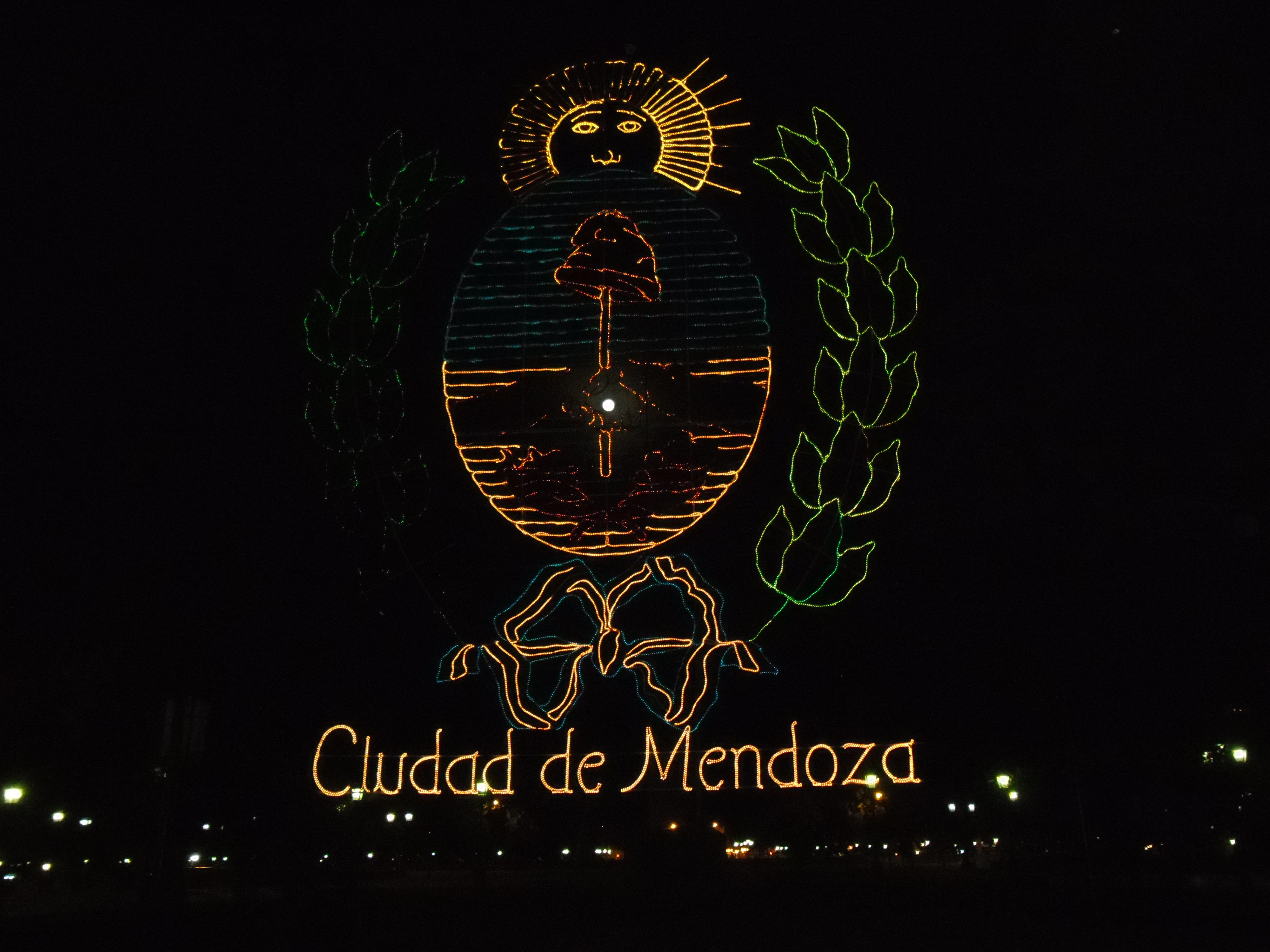 El escudo provincial de la "Plaza Independencia", iluminado de noche.